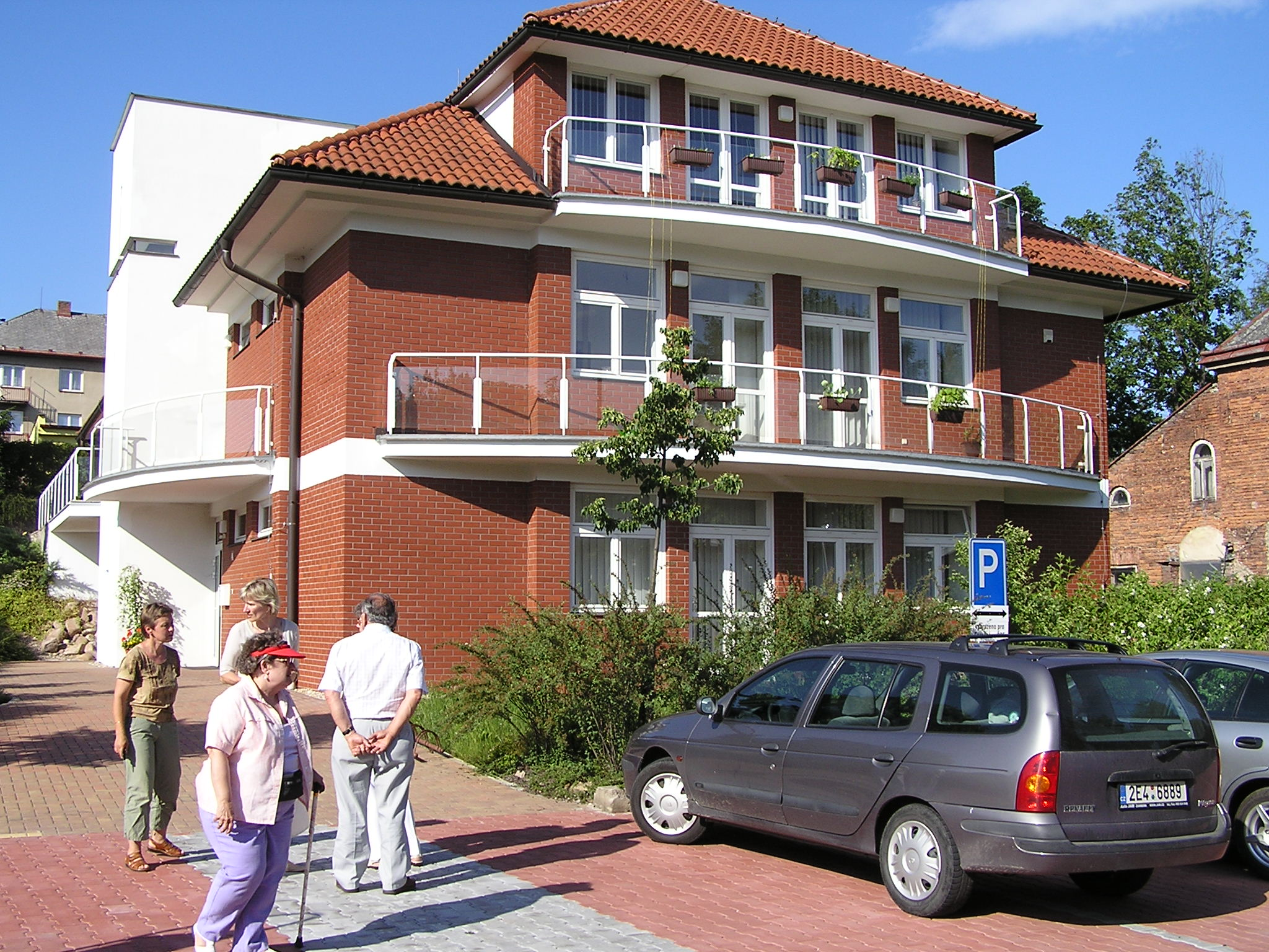 Kostel Českobratrské církve evangelické, Letohrad